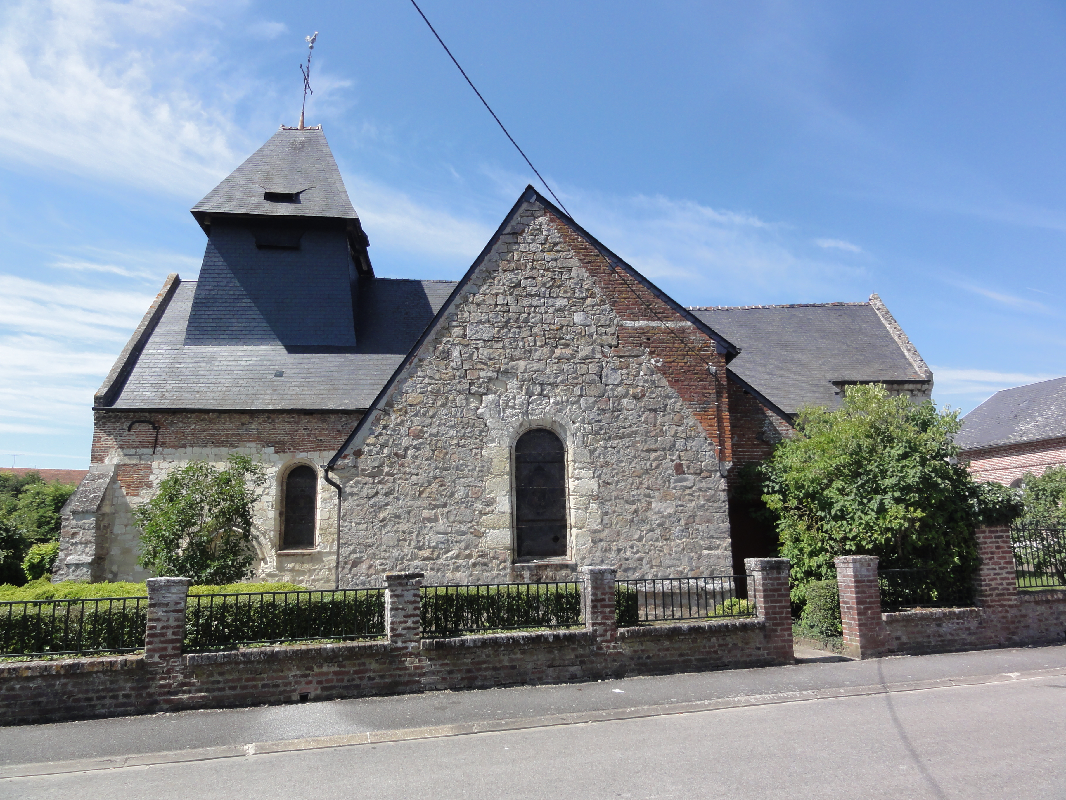 Marcy-sous-Marle (Aisne) église